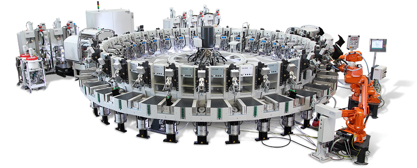 DESMA Direktansohlungsanlage